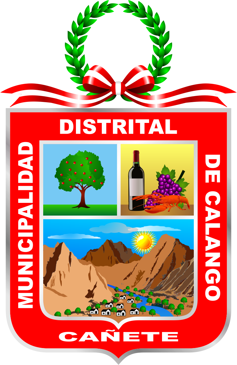 Distrito de Calango - Provincia de Cañete - Región Lima